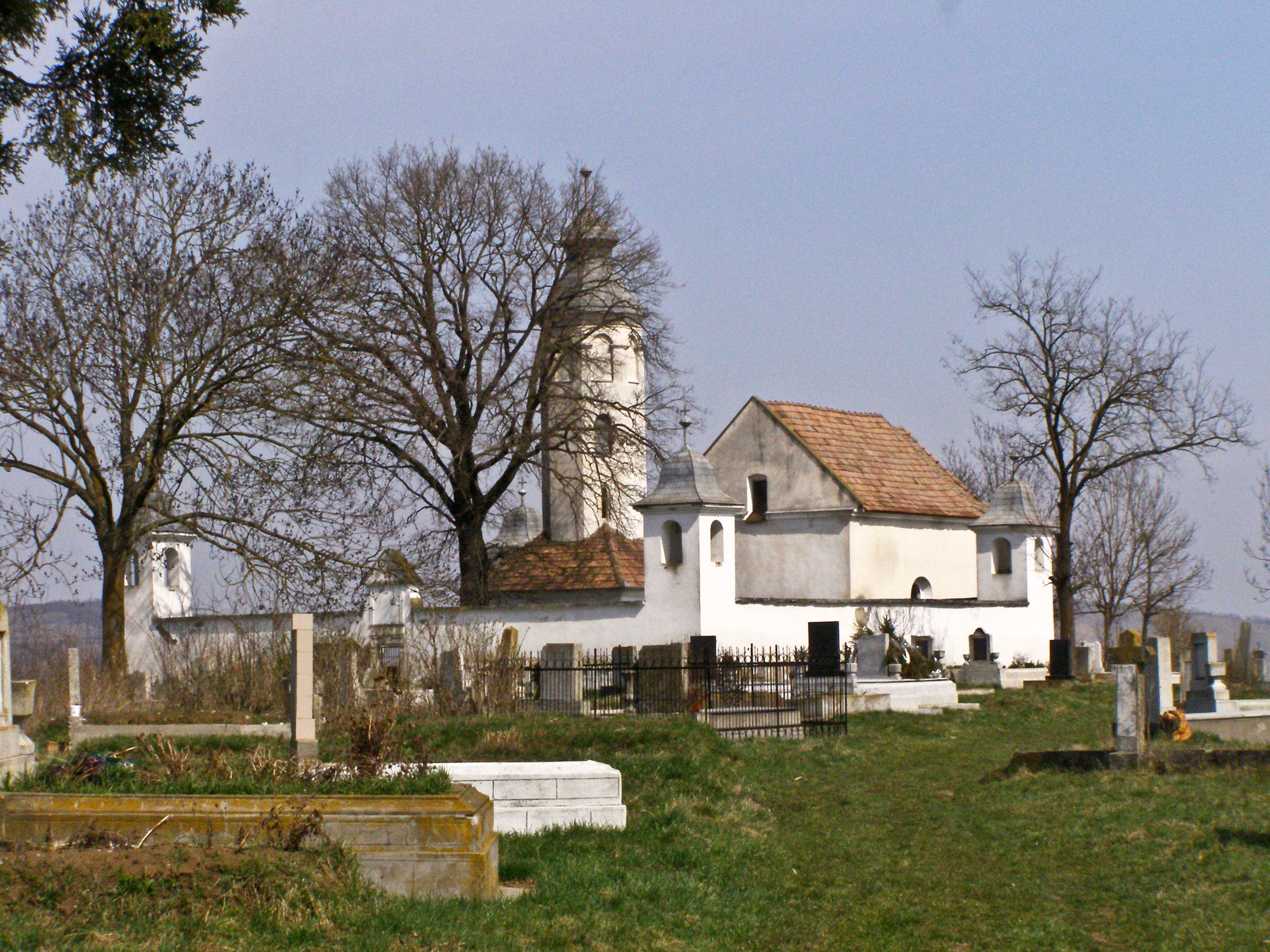 Capela Haller